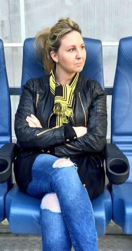 Josefine Lindén sittande på en avbytarbänk